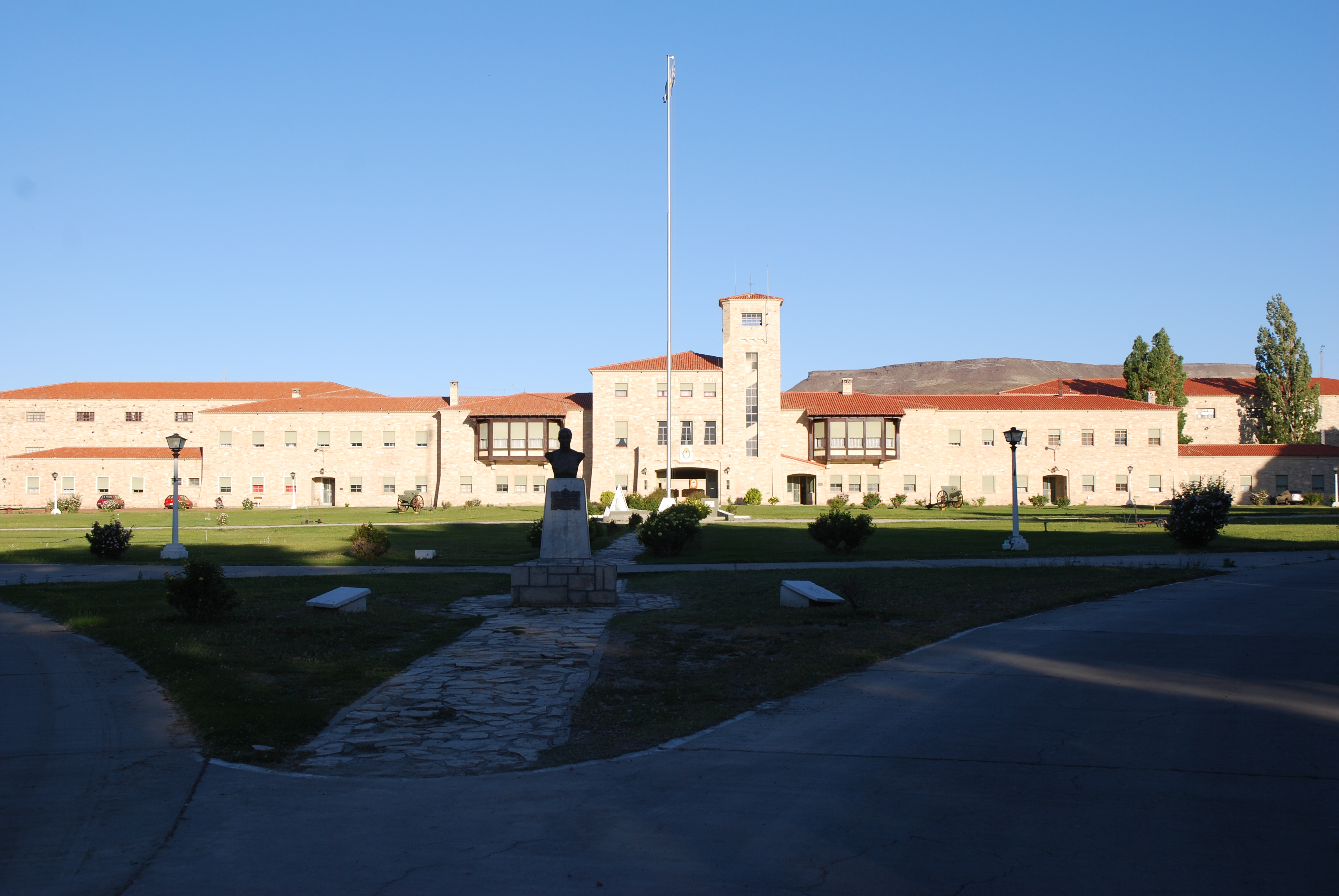 Vista del Regimiento de Infantería de Montaña 10 (Covunco, provincia del Neuquen).